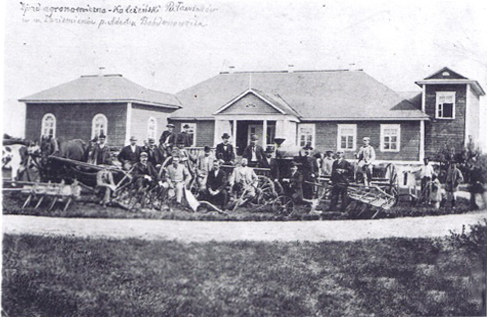 Беларуская (тарашкевіца): Зацемень (Zaciemień), сядзіба Багдановічаў (Bahdanovič). Агранамічны зьезд